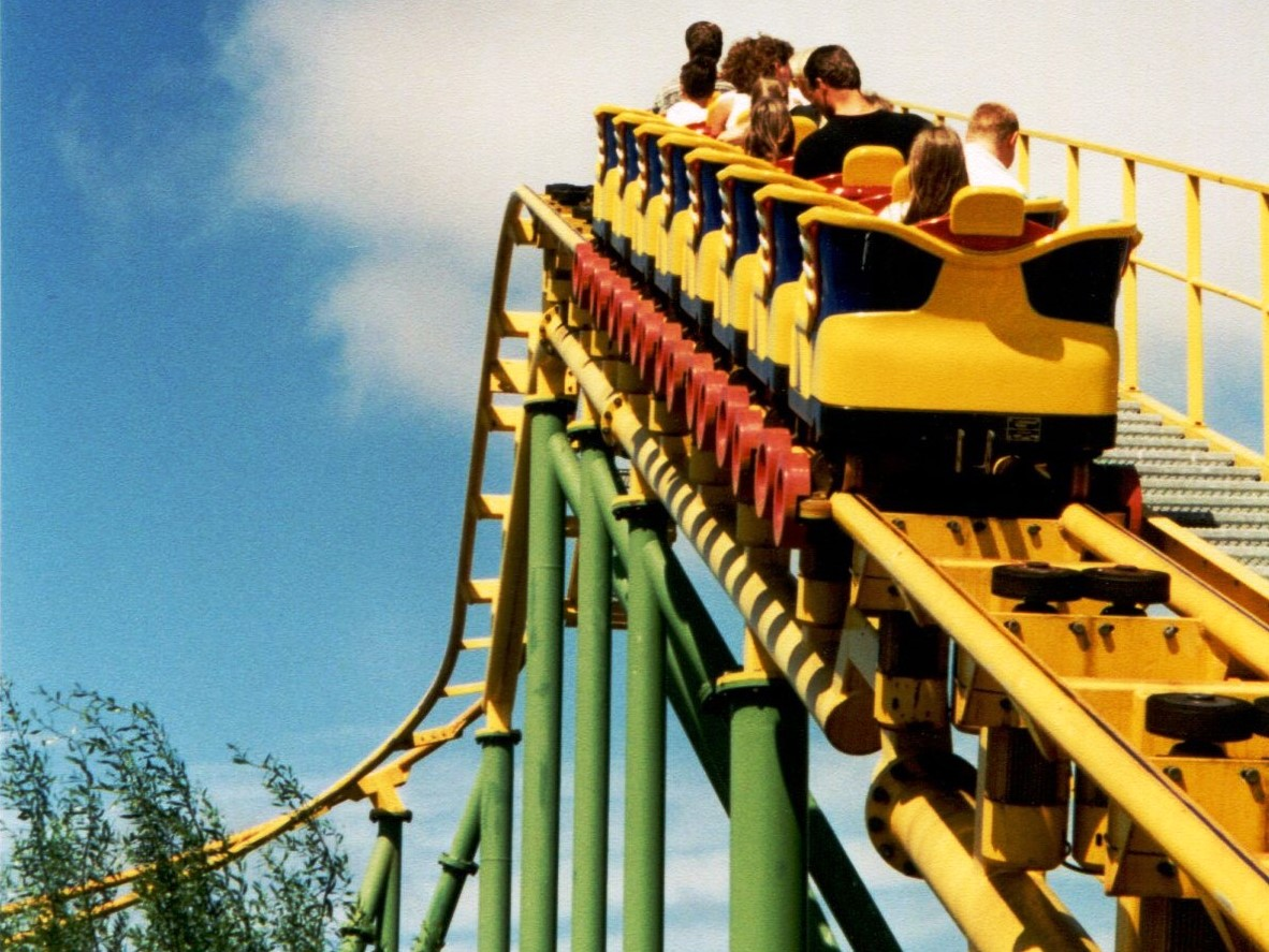 MeliparkRollerskater